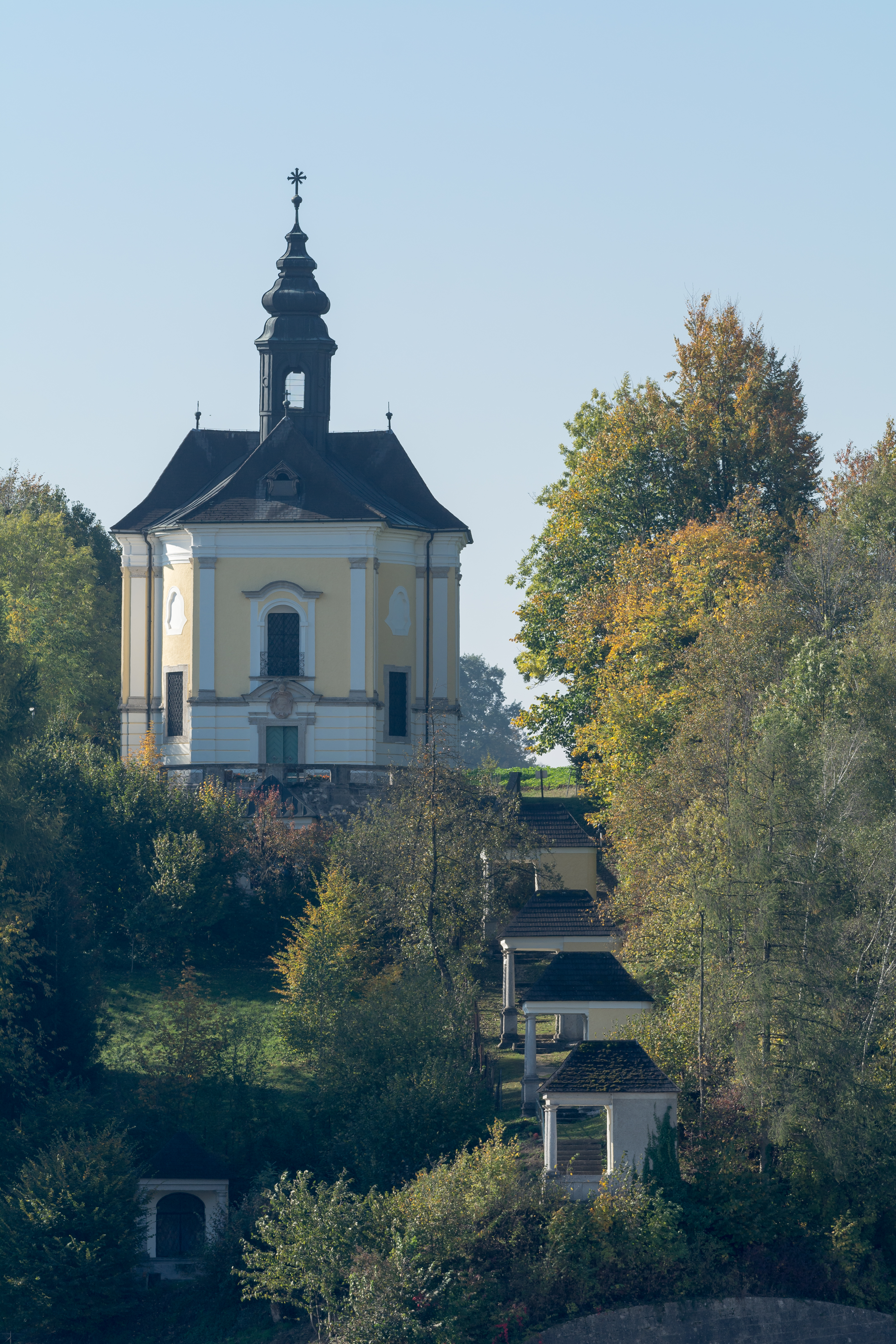 Die Kalvarienbergkirche zum Gekreuzigten Heiland und der Kreuzweg in Kremsmünster wurden 1736/37 von Wolfgang Seethaler nach Plänen des Paters Rupert Langpartner erbaut. Die Mitwirkung von Johann Michael Prunner wird vermutet.